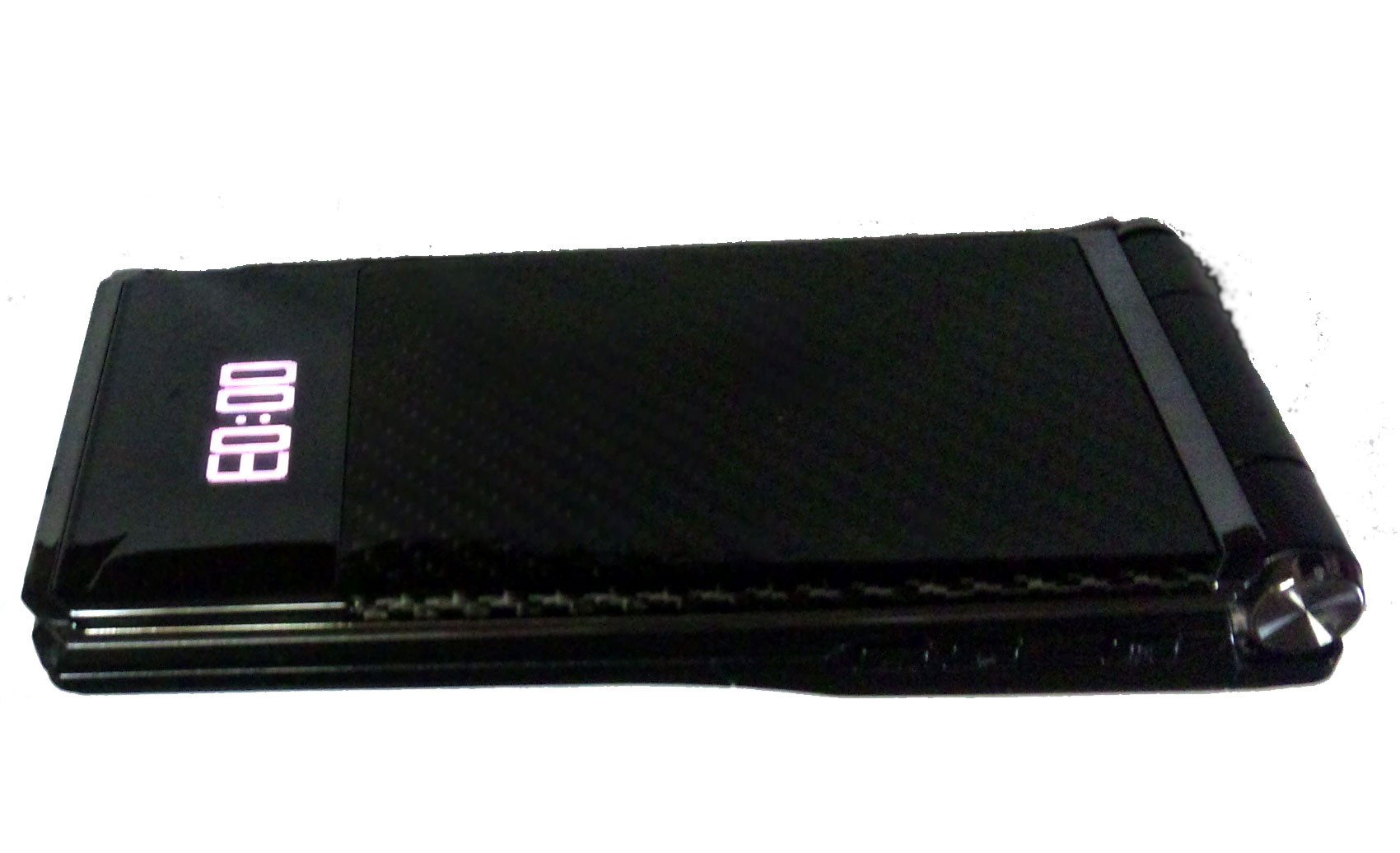 docomo STYLE series F-04D カーボンブラック